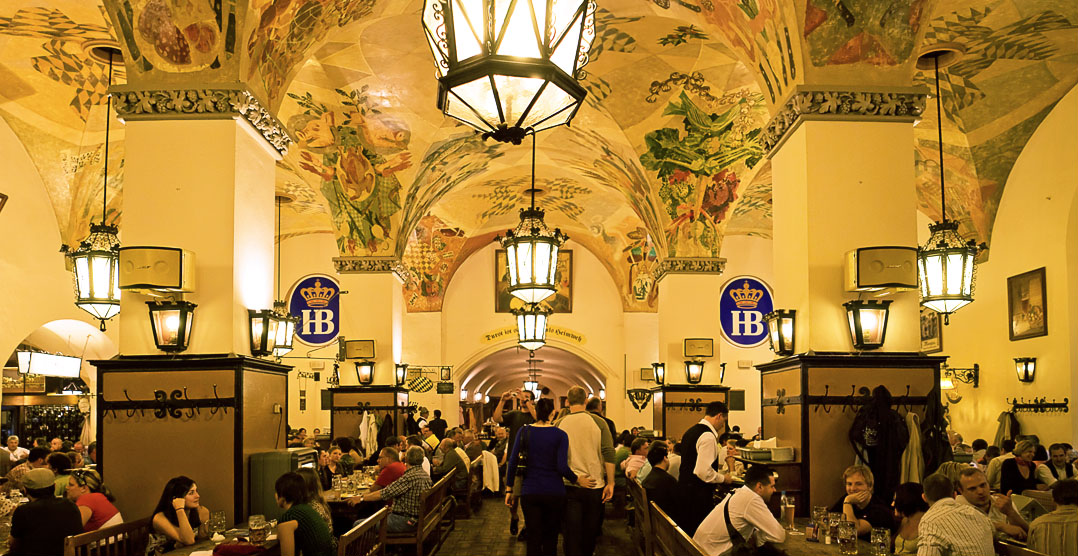 Hofbraeuhaus Muenchen